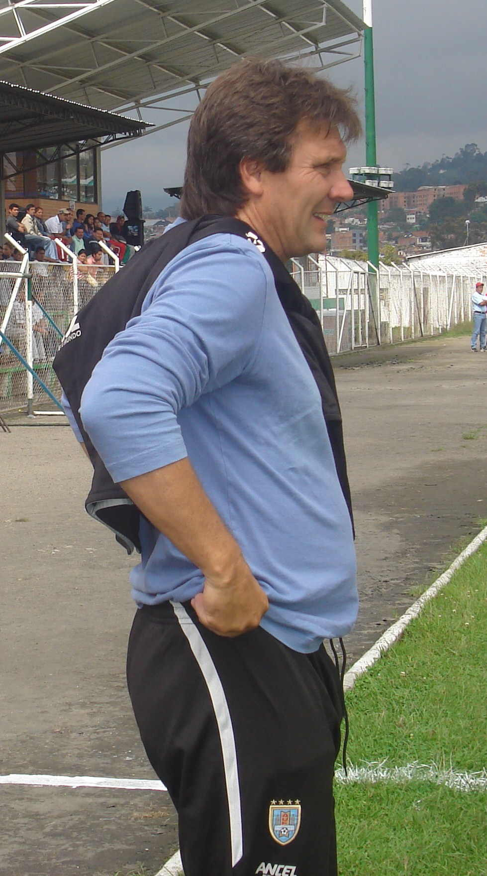 Campeonato Bogotá Colombia